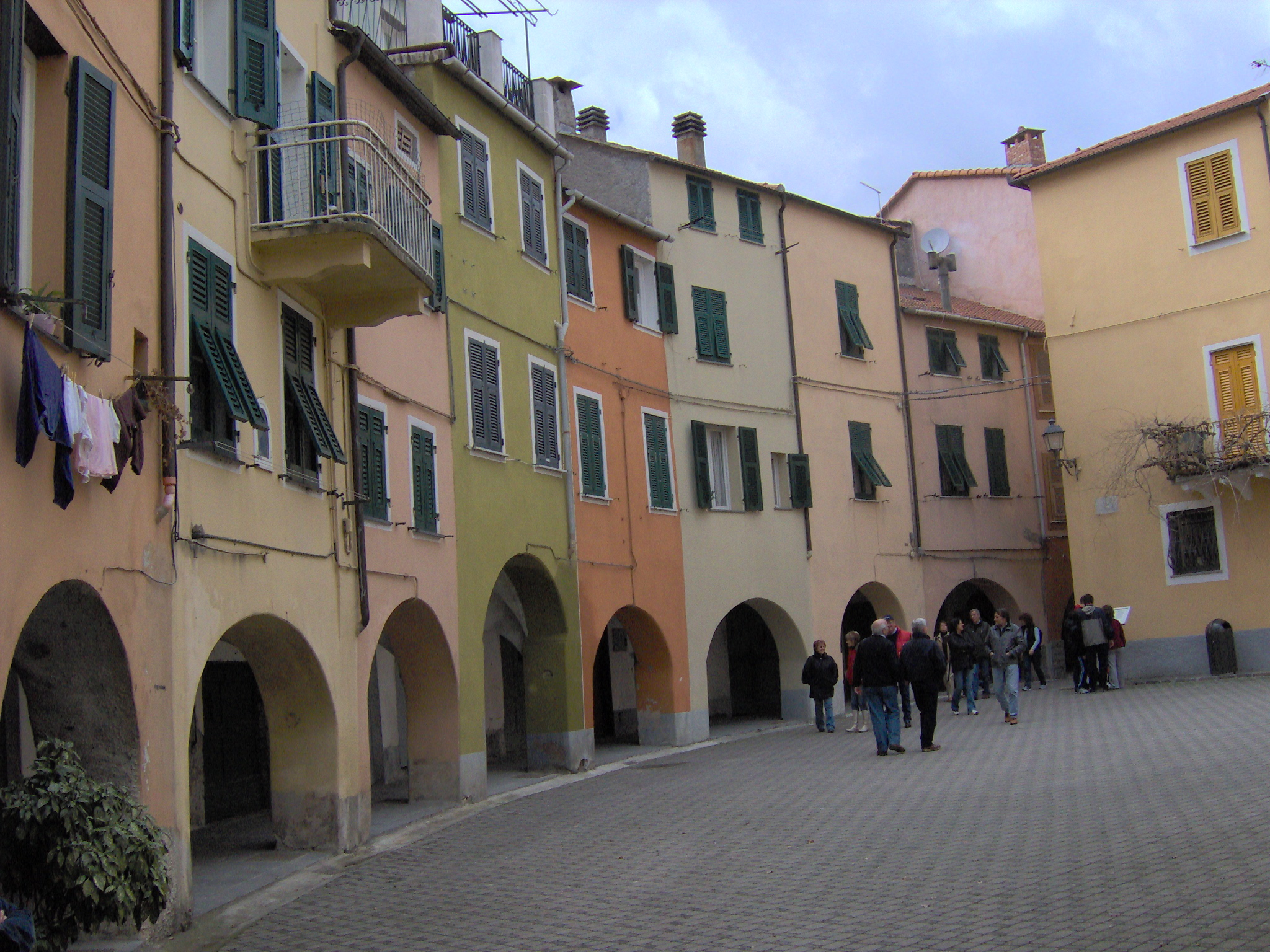 Stadtansicht von Varese Ligure.